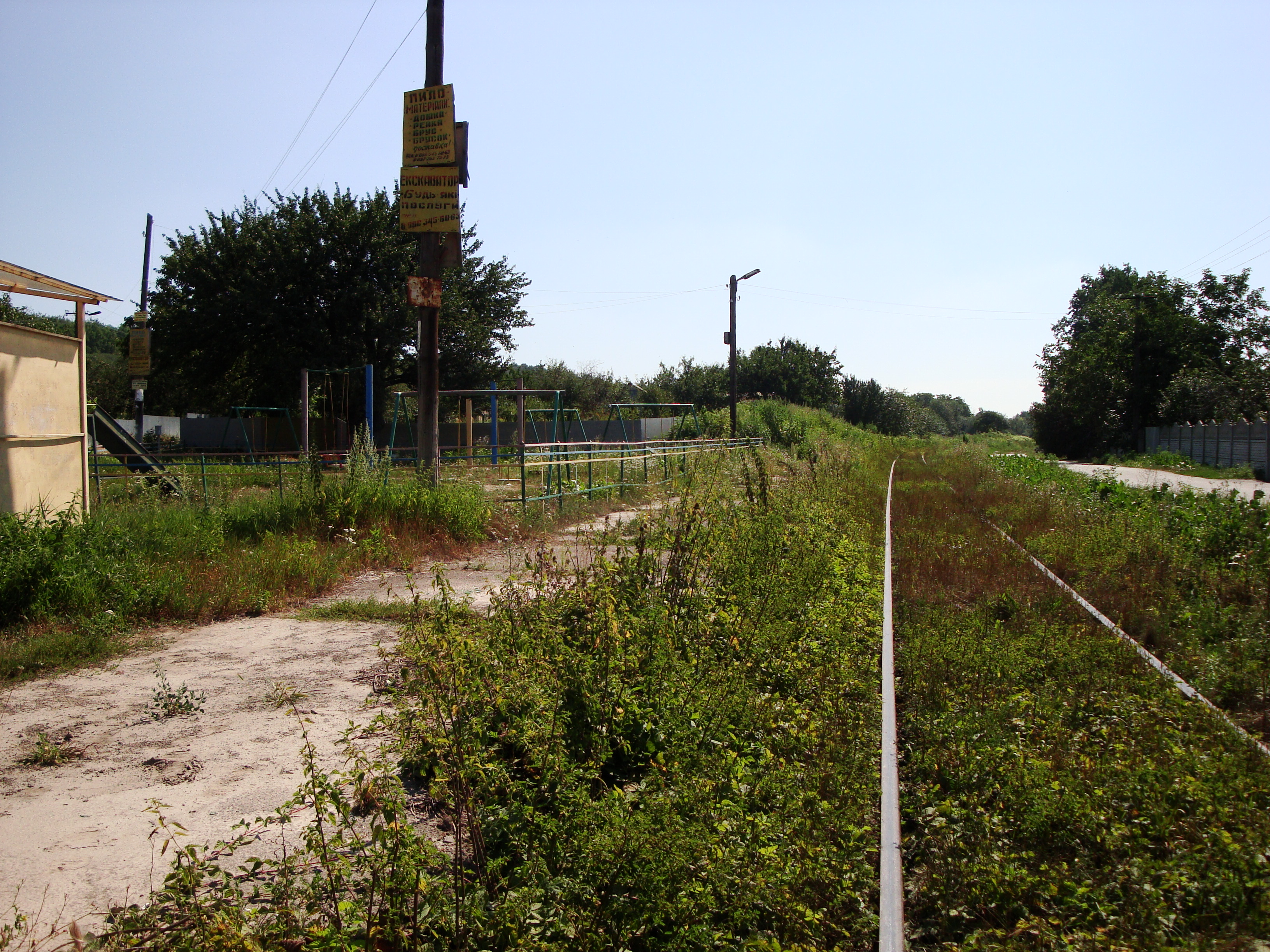 З.п. Черкес Південно-Західної залізниці